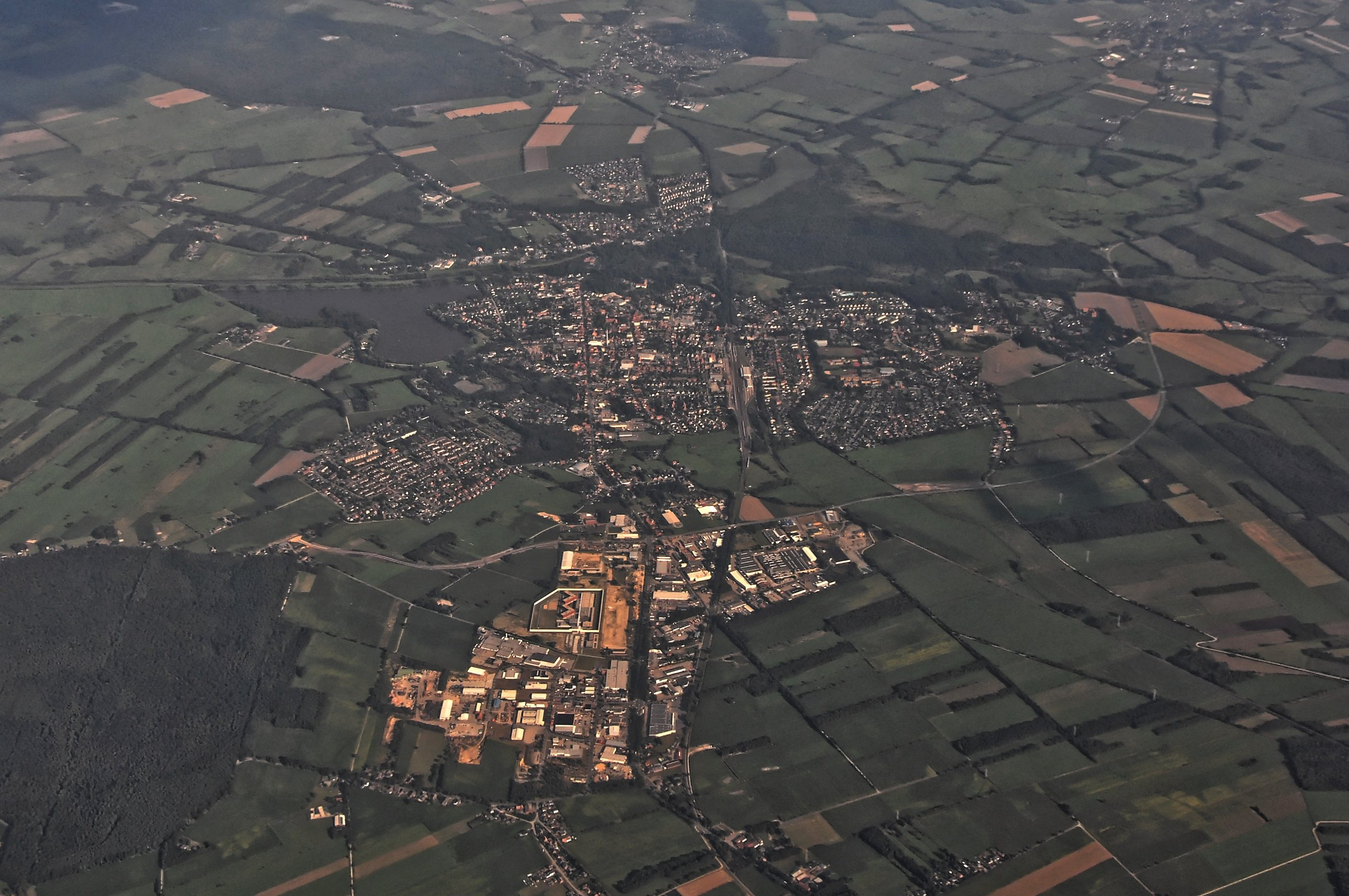 Bilder vom Flug -Rom-Düsseldorf-Hamburg 2013 Dieses Foto entstand in Zusammenarbeit mit Stadtbesichtigungen.de Die Seiten Stadtbesichtigungen.de, der dazugehörige Reise Blog sowie die Facebookseite: Stadtbesichtigungen Rom dürfen dieses Bild für Ihre Veröffentlichungen ohne den Hinweis auf Wikipedia, Commons bzw der Lizenz verwenden. Die Verantwortlichen habe von mir (Ra Boe) die Originaldaten zur freien Verfügung übermittelt bekommen.